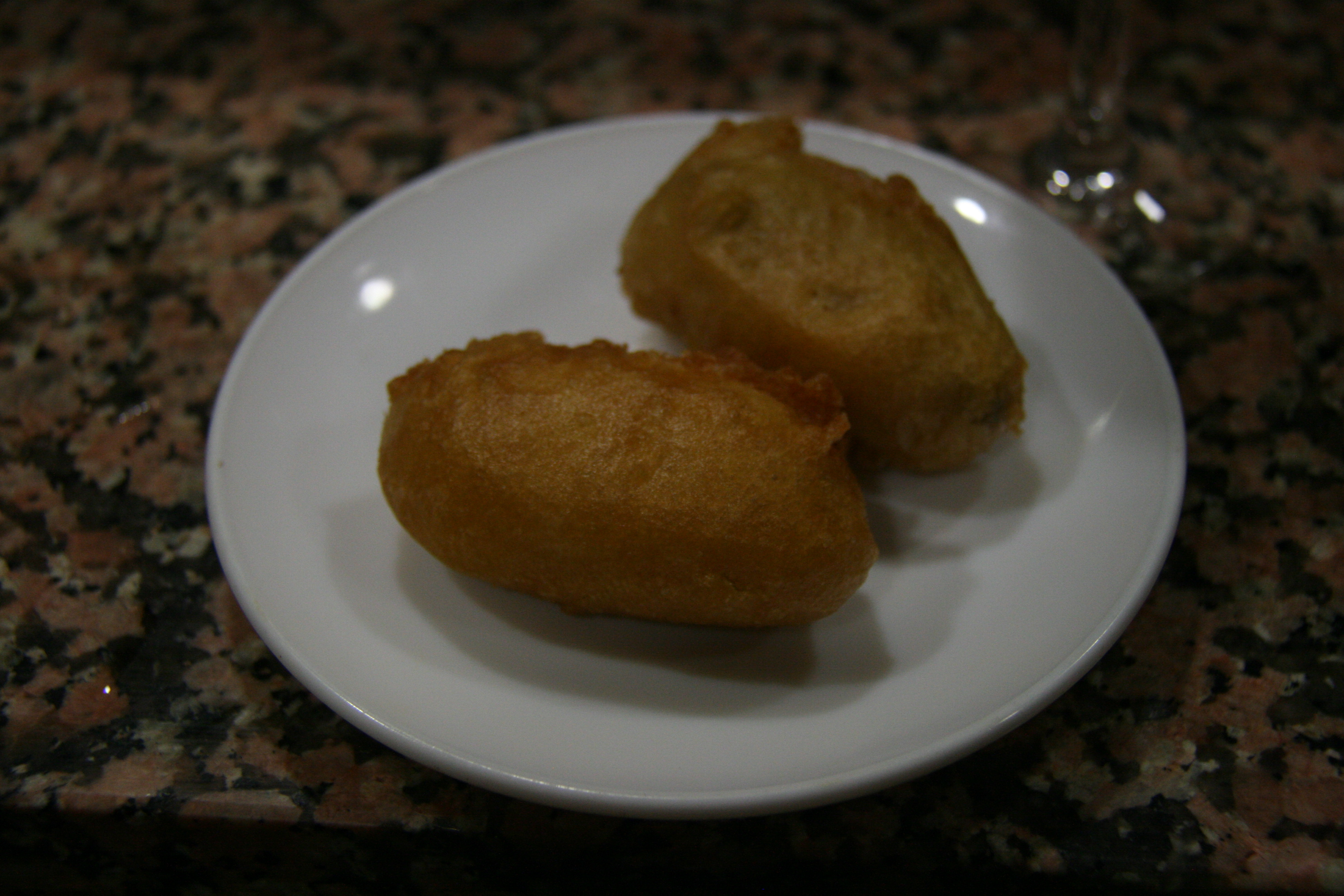 Perdiz de Mar - Zamora - bar bambu - Sardina rebozada